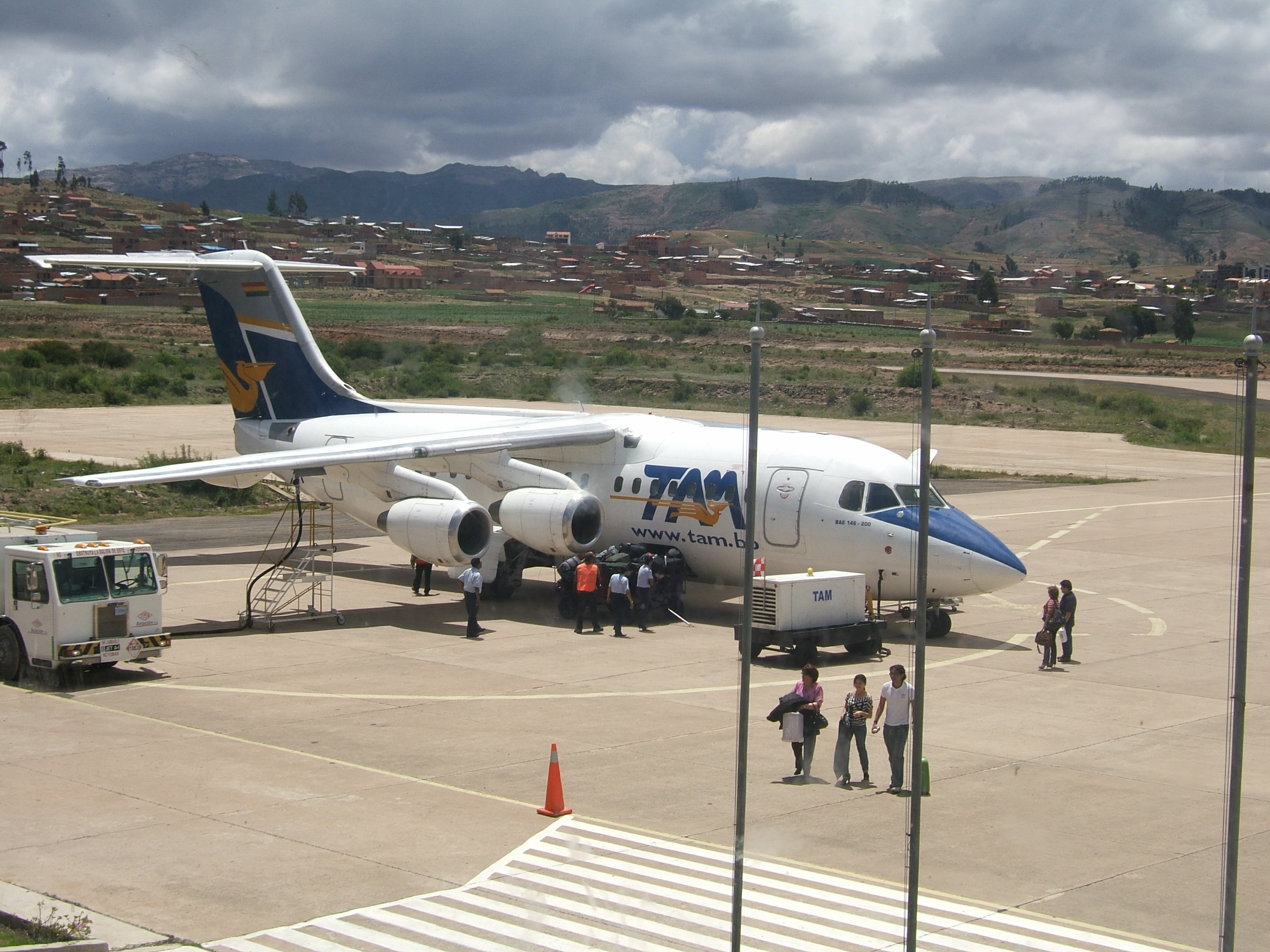 Bae de Transporte Aereo Militar